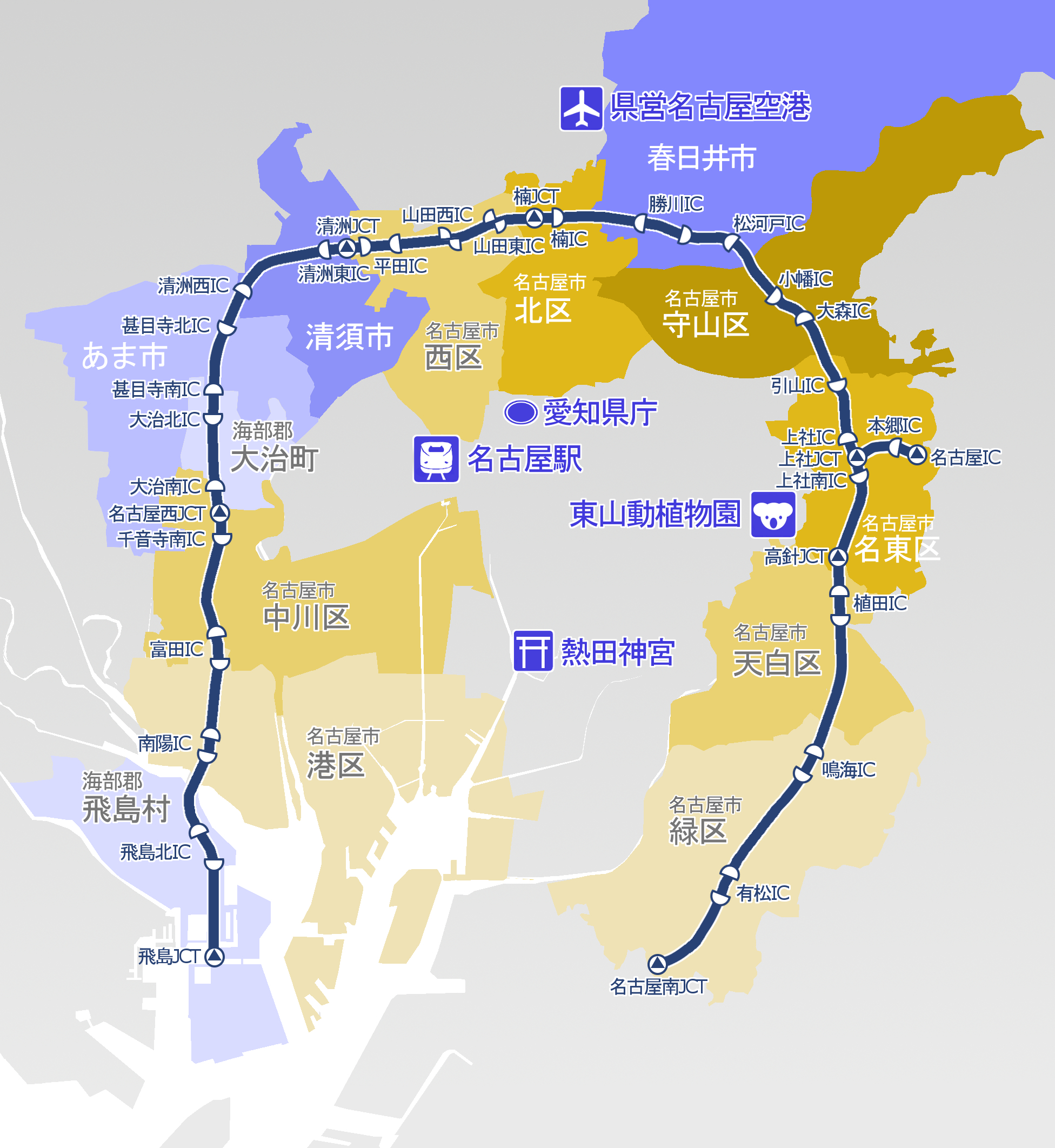 名古屋第二環状自動車道 通過地区町村